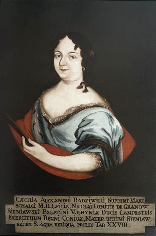 Беларуская (тарашкевіца): Партрэт Цэцыліі Марыі Сяняўскай (Cecylija Maryja Sianiaŭskaja) з князёў Радзівілаў (Radzivił)